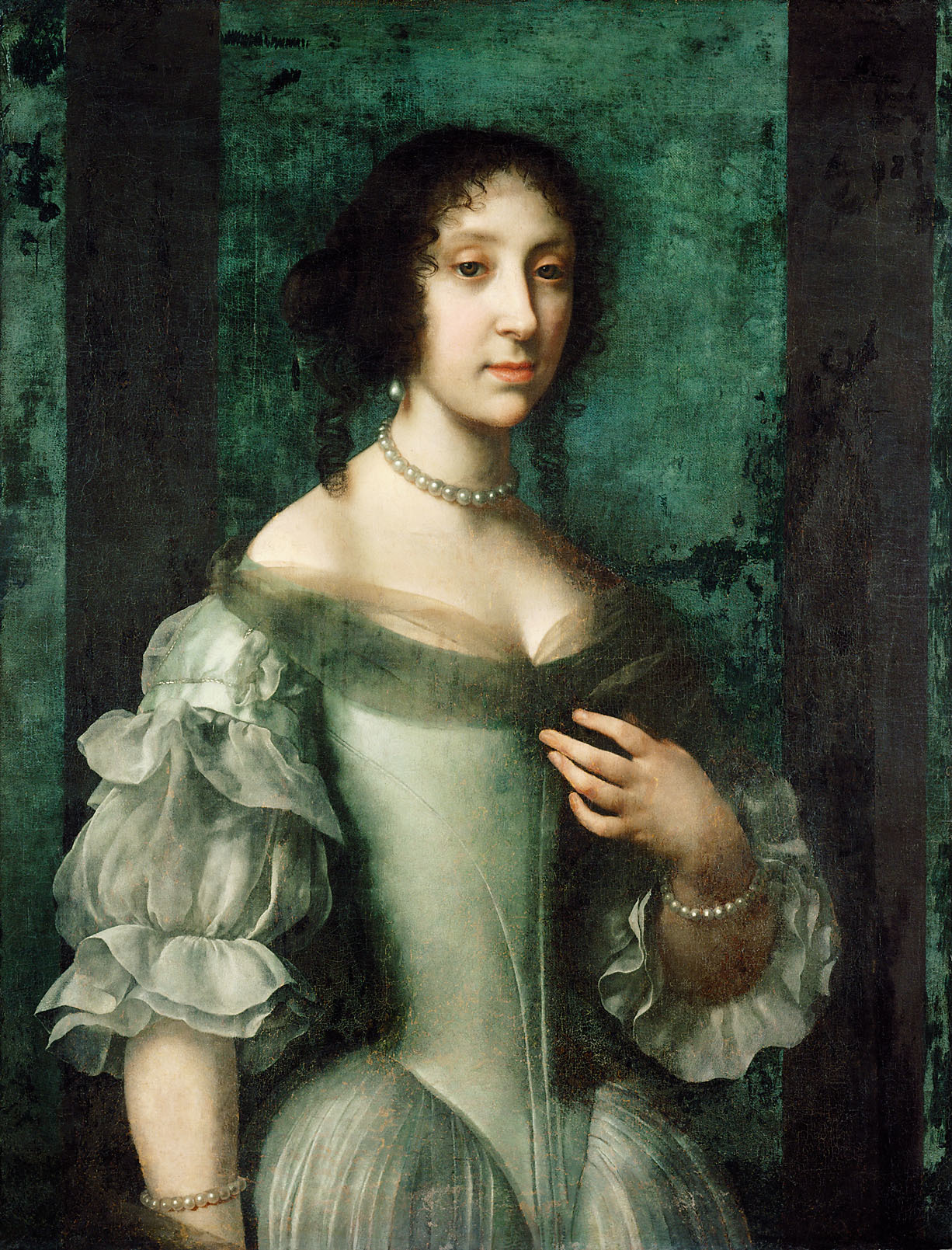 Abgebildete Person: Kaiserin Claudia Felicitas, Tochter des Erzh. Ferdinand Karl von Habsburg Österreich